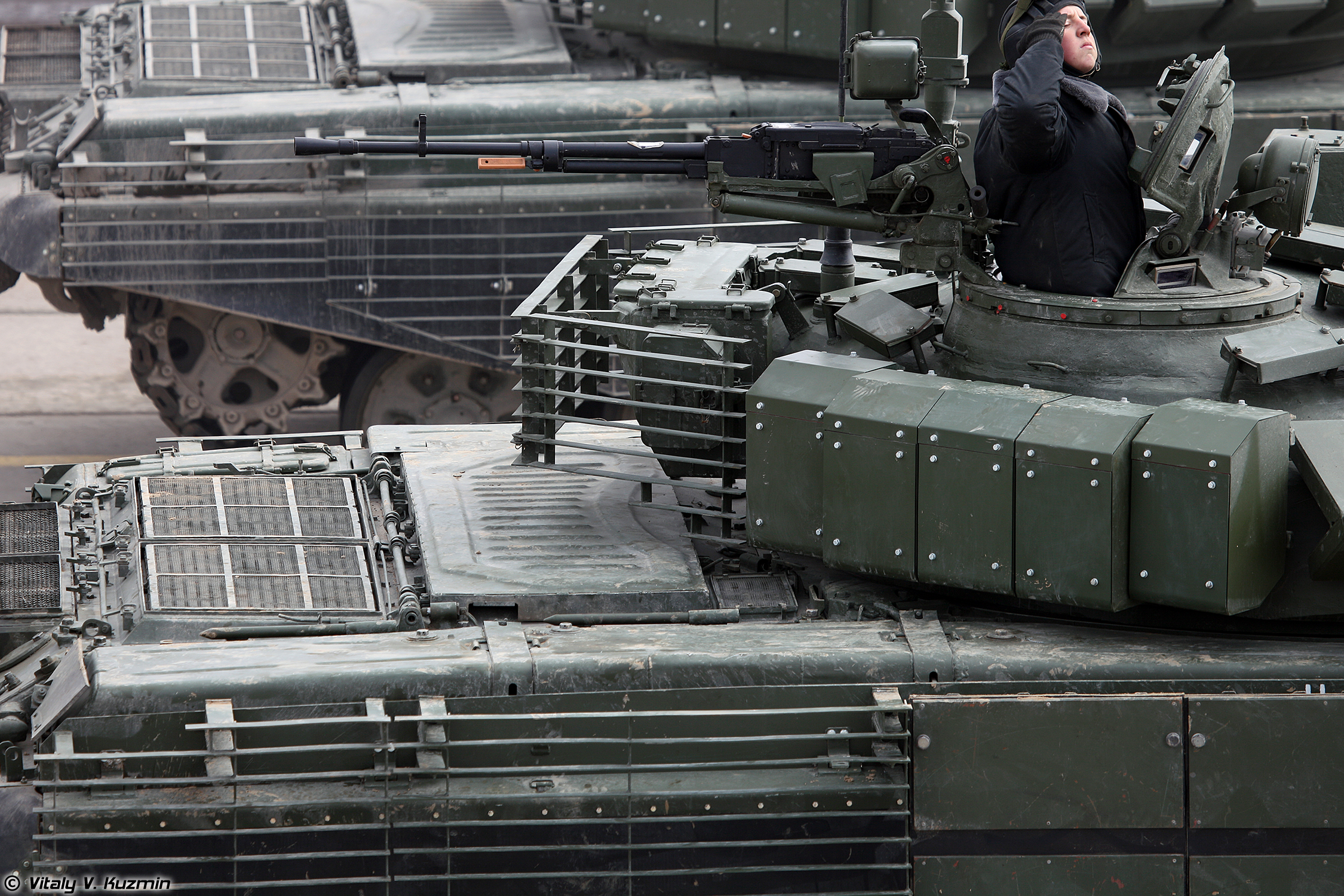 Модернизированный Т-72Б3 образца 2016 года с дополнительной защитой (Modernized T-72B3 with additional armor)